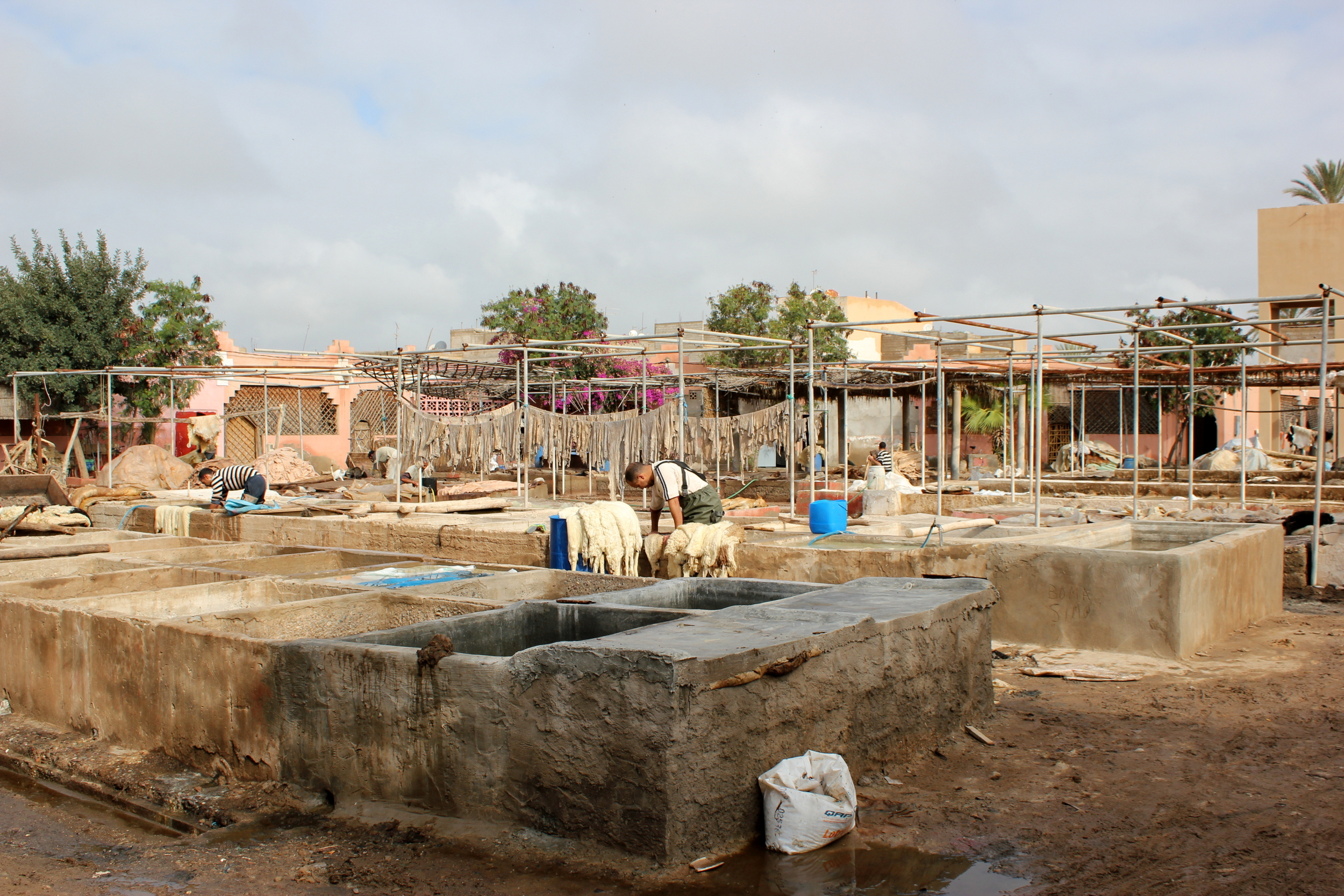 Gerberei in Taroudannt, Marokko.